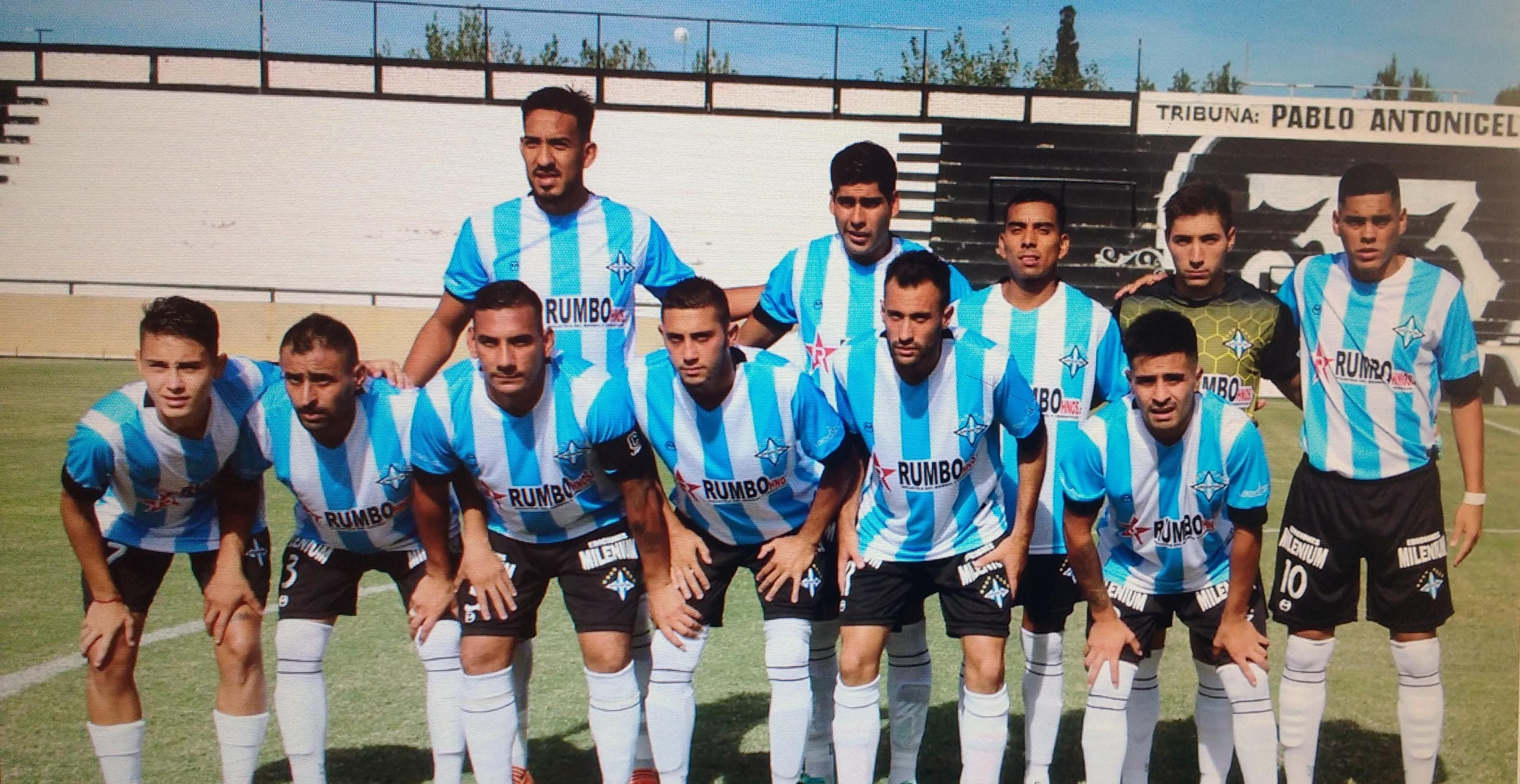 Atlético Argentino 2019 , en el Estadio Victor Antonio Legrotaglie